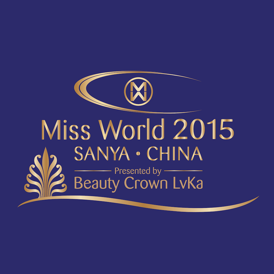 Miss World 2015 logo